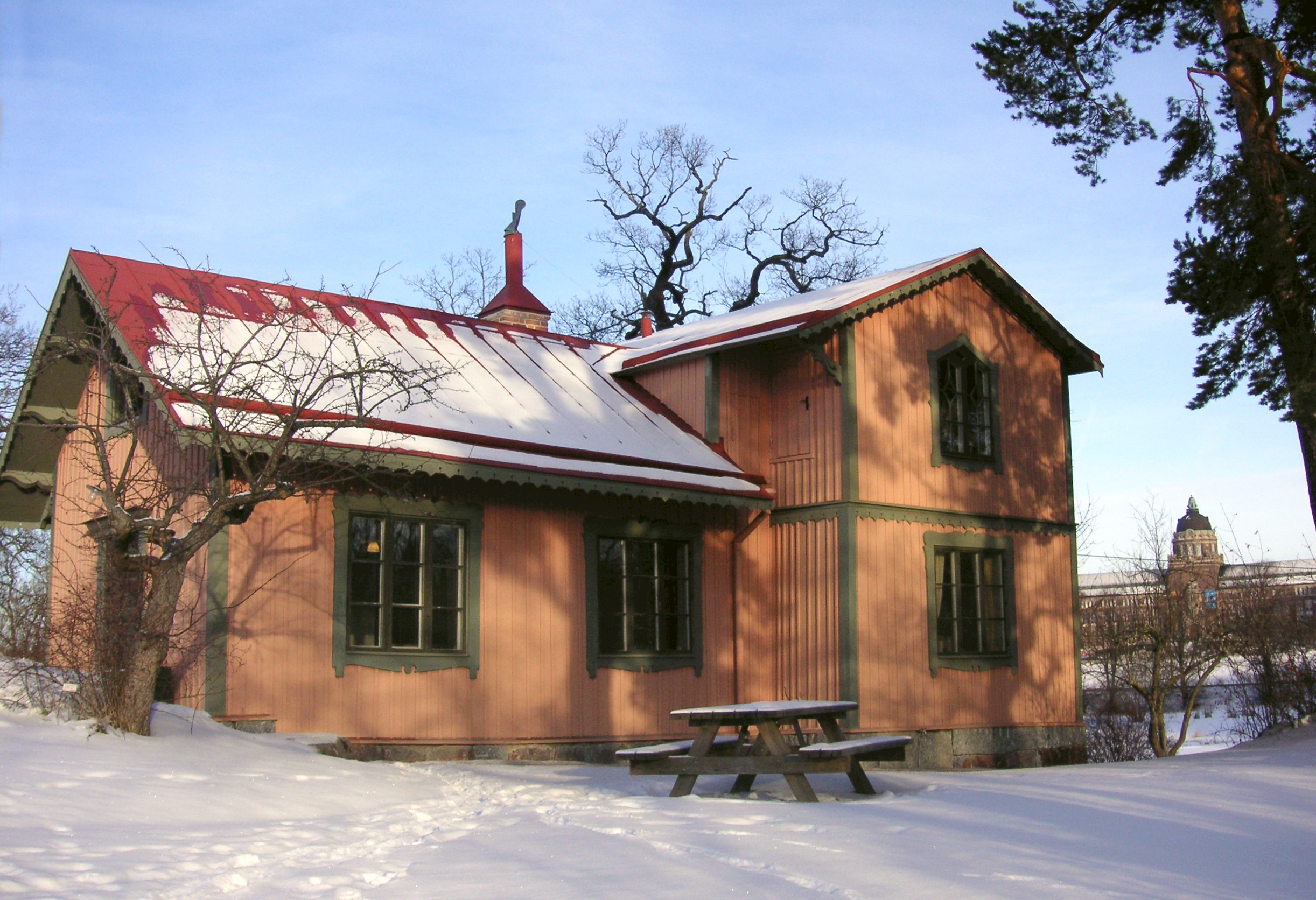 Bebyggelsen Gustavsborg vid Brunnsviken